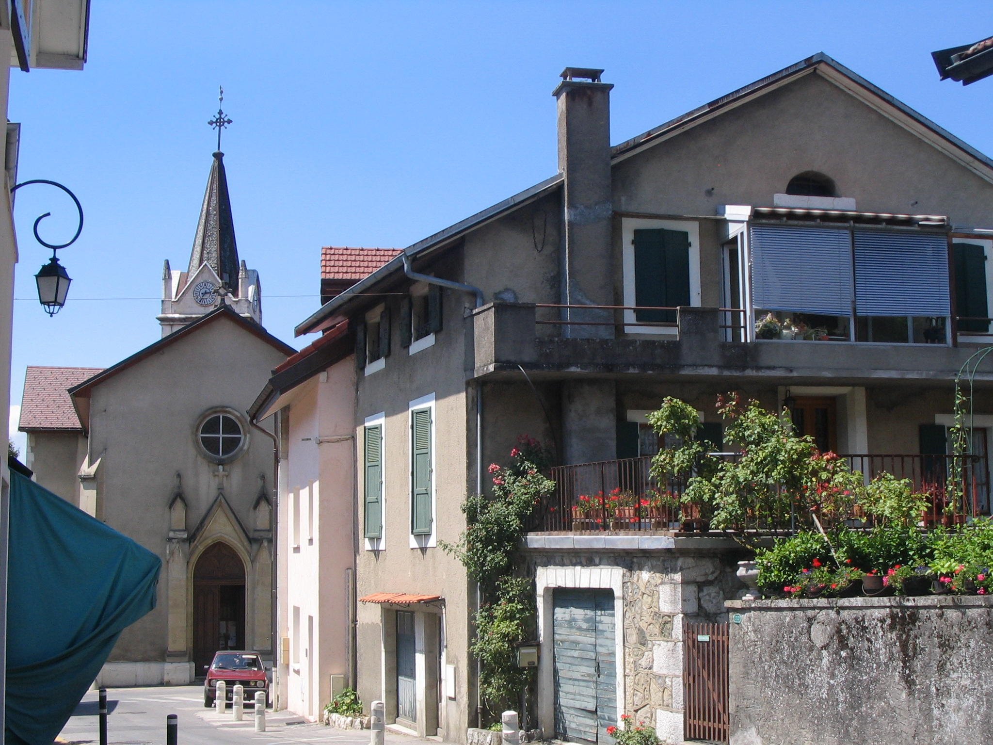 Collonges-sous-Salève